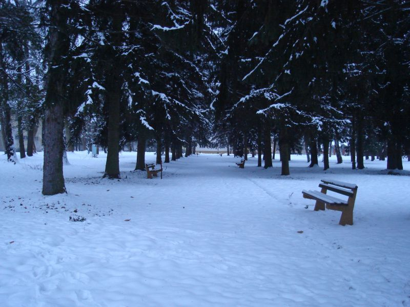 Zimski mir